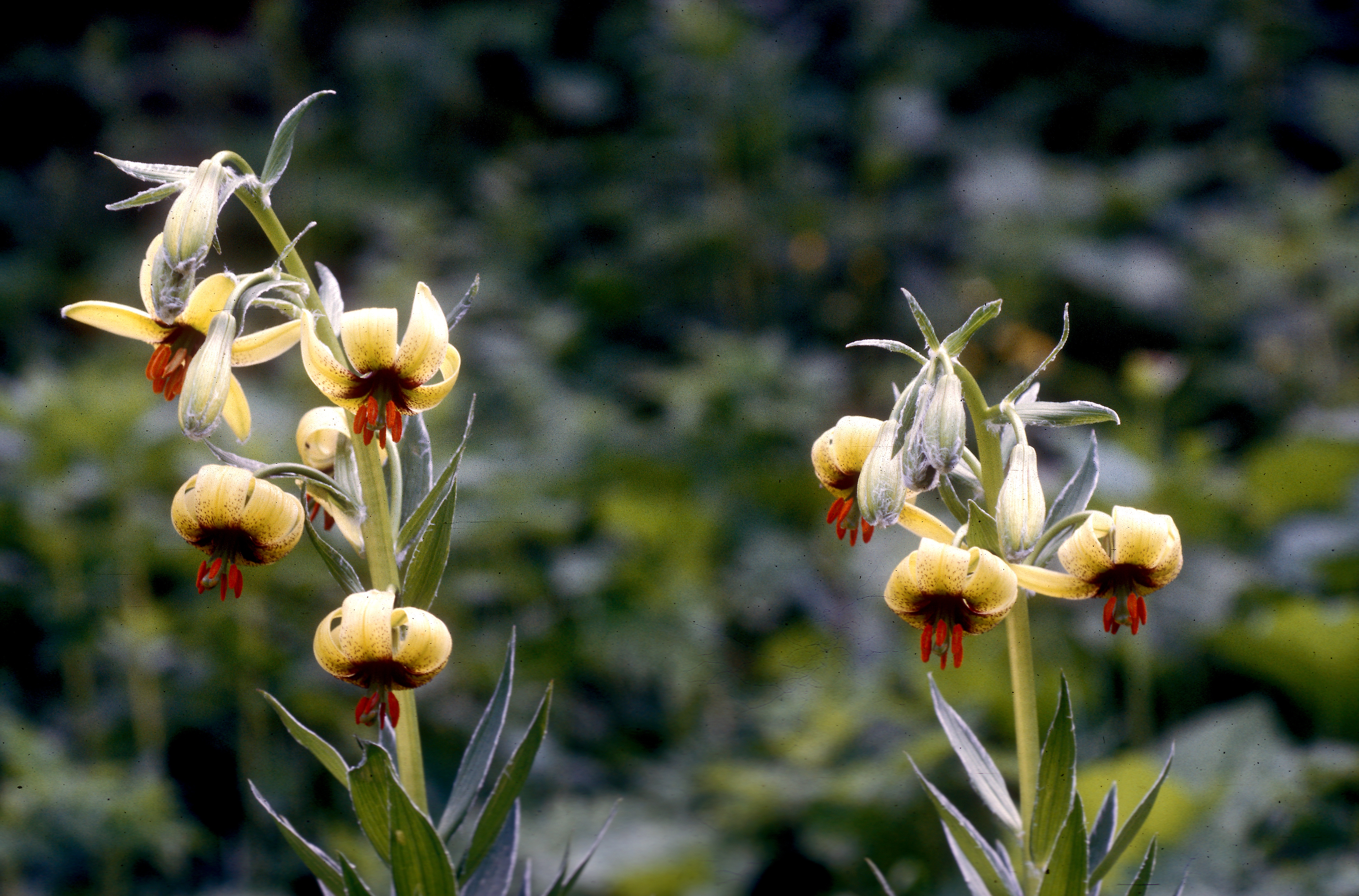 Lilium ciliatum in habitat at Kümbet, Turkey